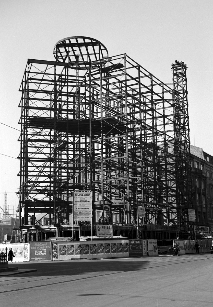 Stahlgerüst des Juniorhauses in Frankfurt am Main, Aufnahme während der frühen Bauphase